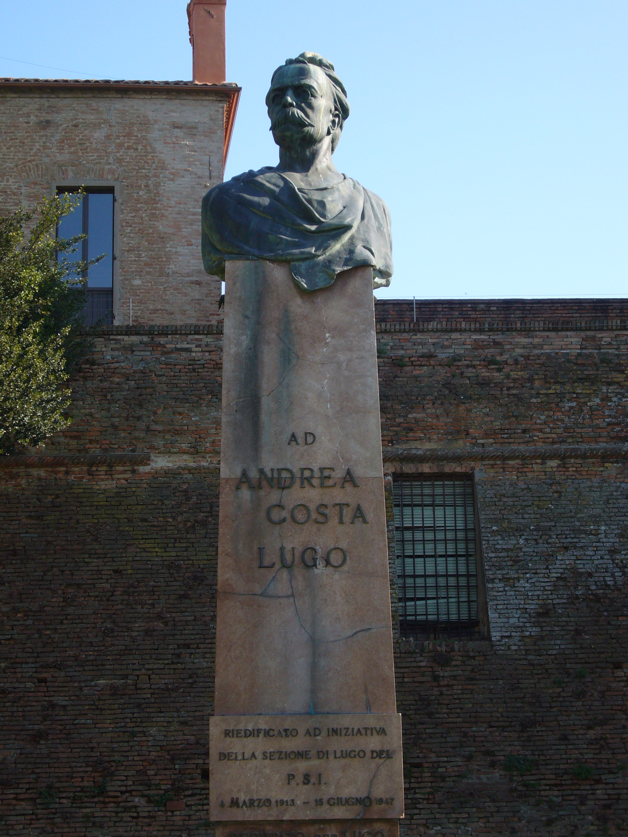 Lugo, busto di Andrea Costa nella Rocca.